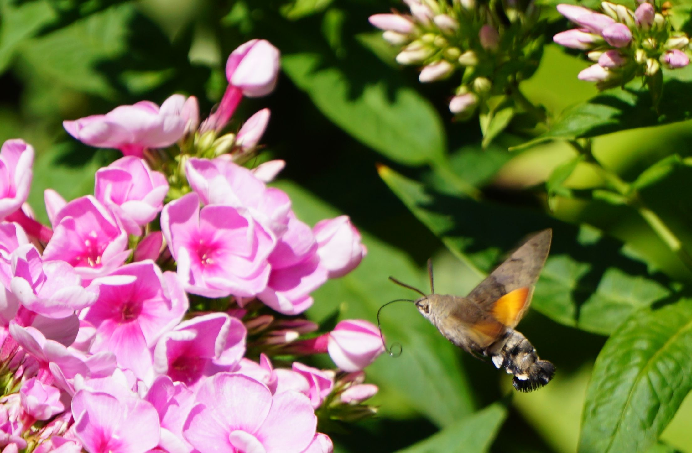 Taubenschwänzchen am Phloks